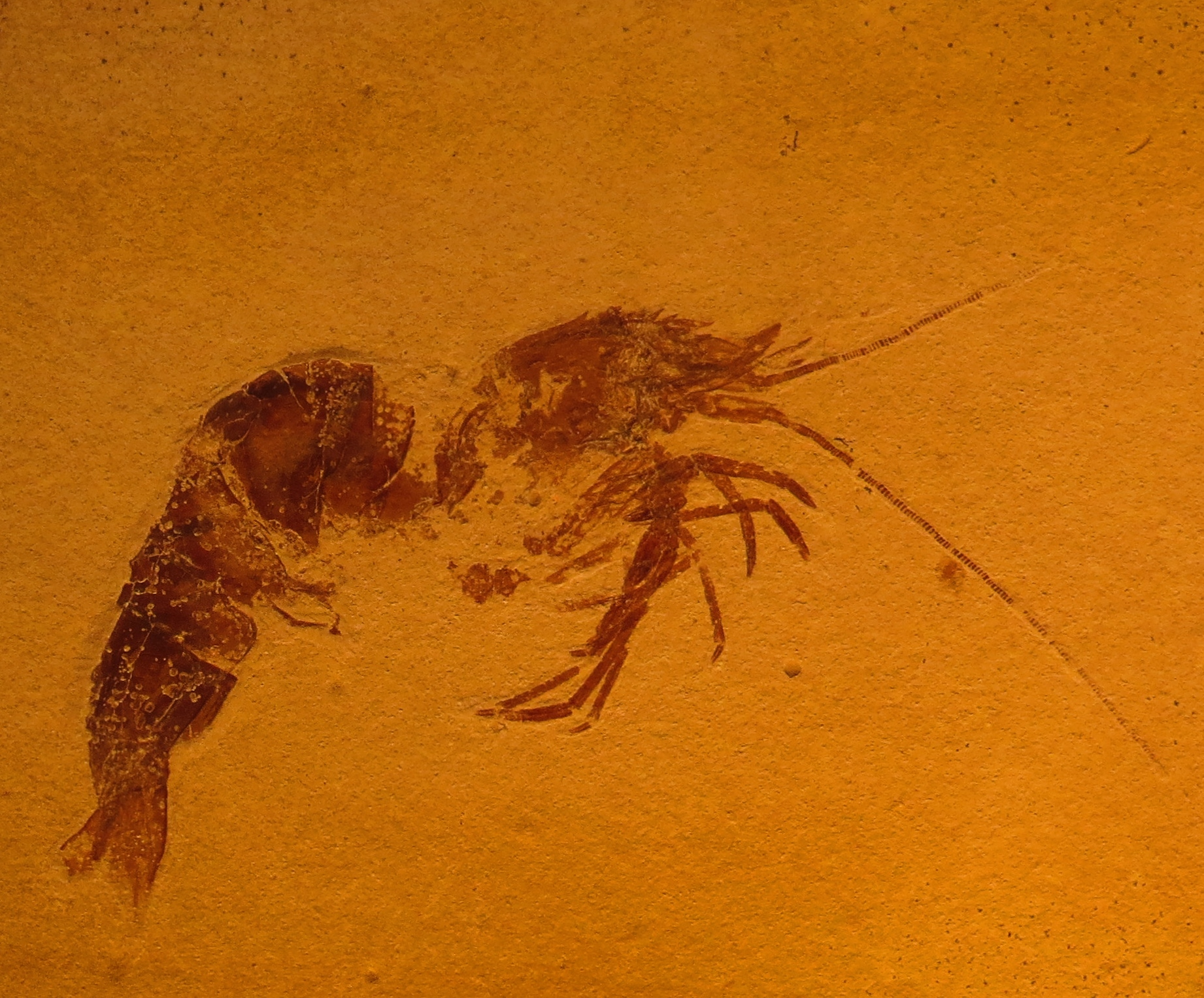 Took the picture at Natural History Museum in Bamberg